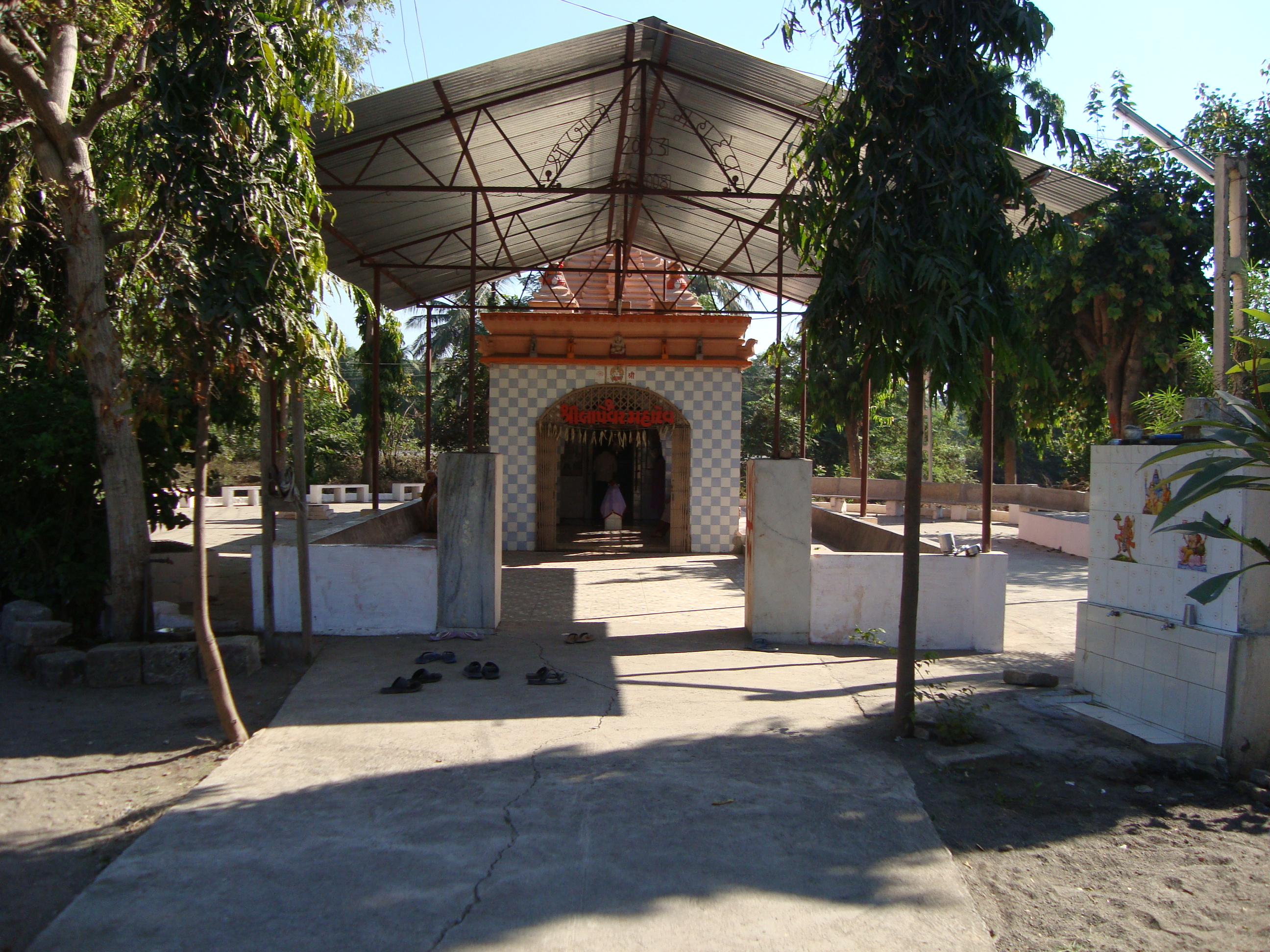 Kodinar, Dushyant's Family, Gujarat - India